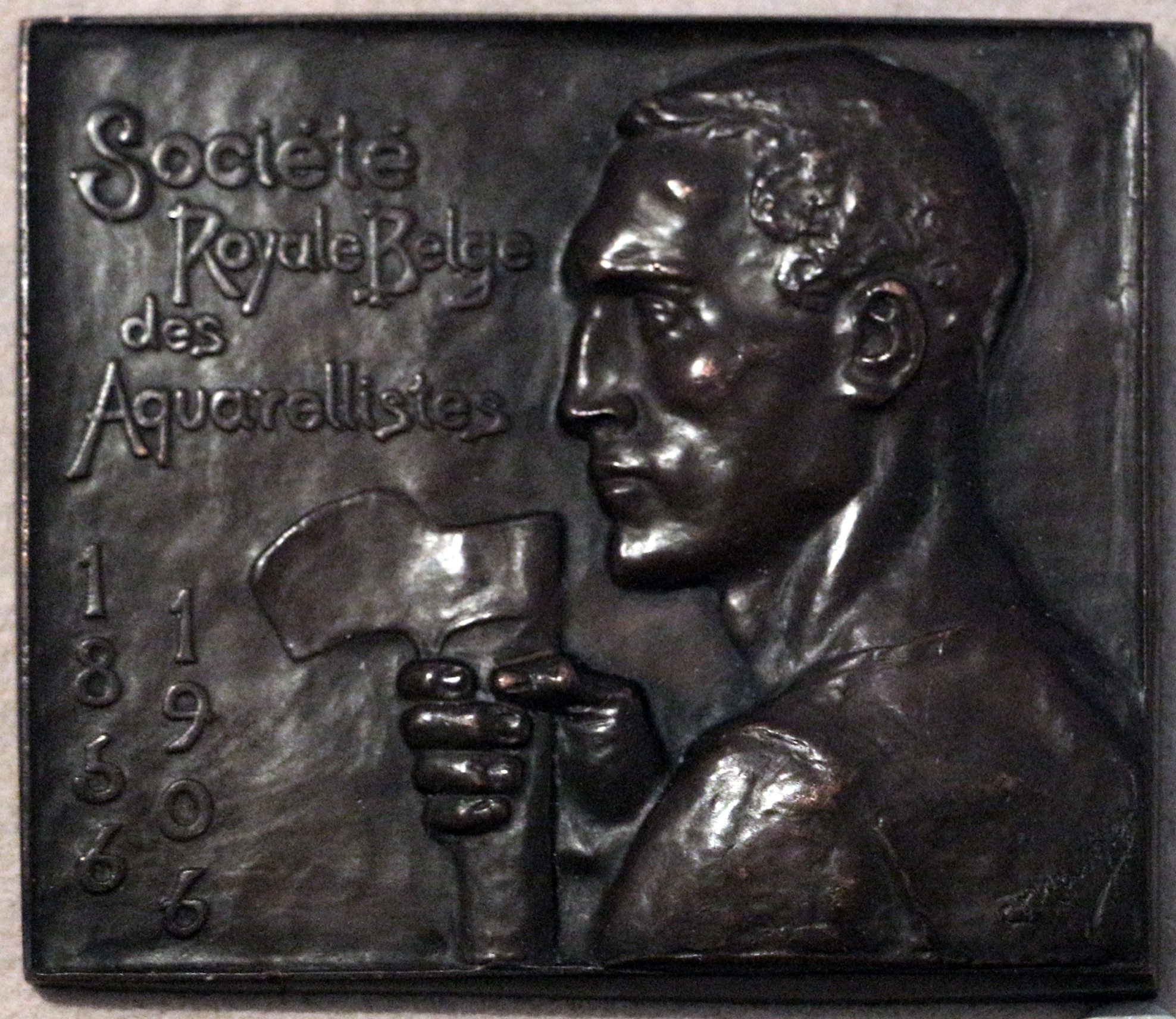 Il parco e i musei di Nervi This is a photo of a monument which is part of cultural heritage of Italy.